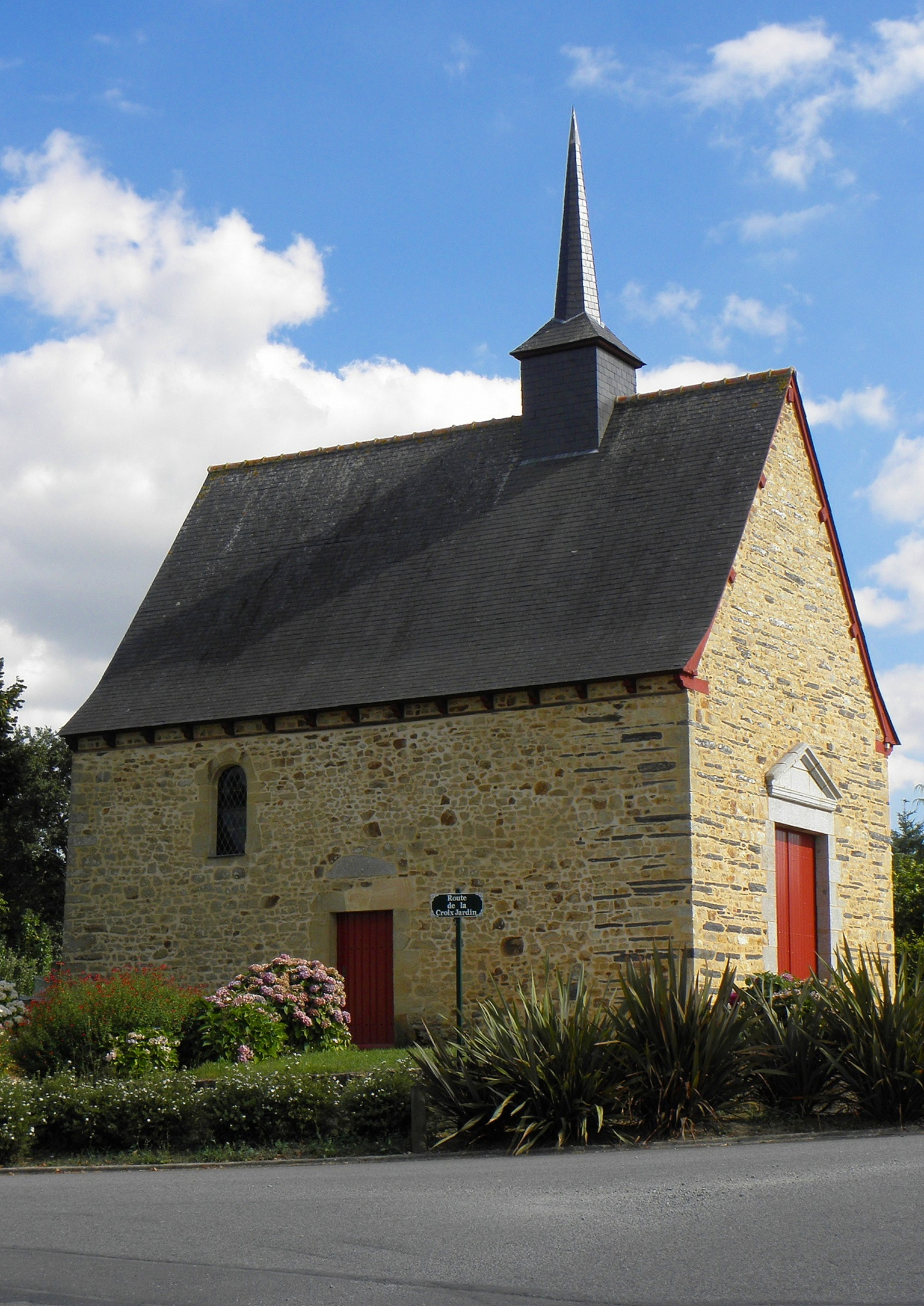 Chapelle Saint-Marc et Saint-Marcoul de Chancé (35).